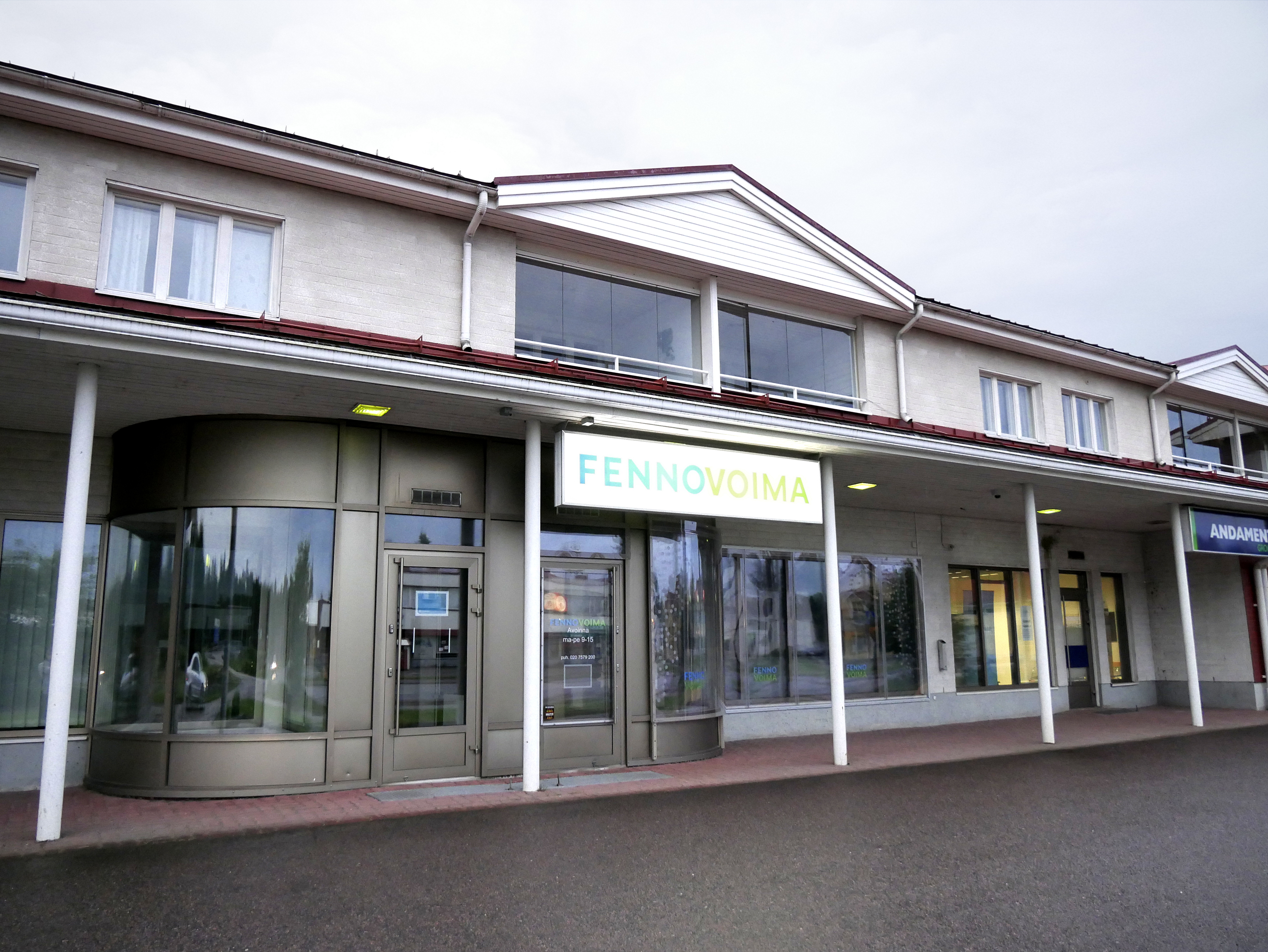 Fennovoiman konttori Pyhäjoella.